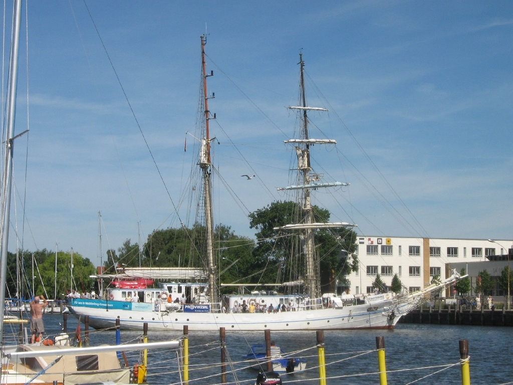 Segelschulschiff Greif auf dem Ryck in Wieck beim Wendemanöver.